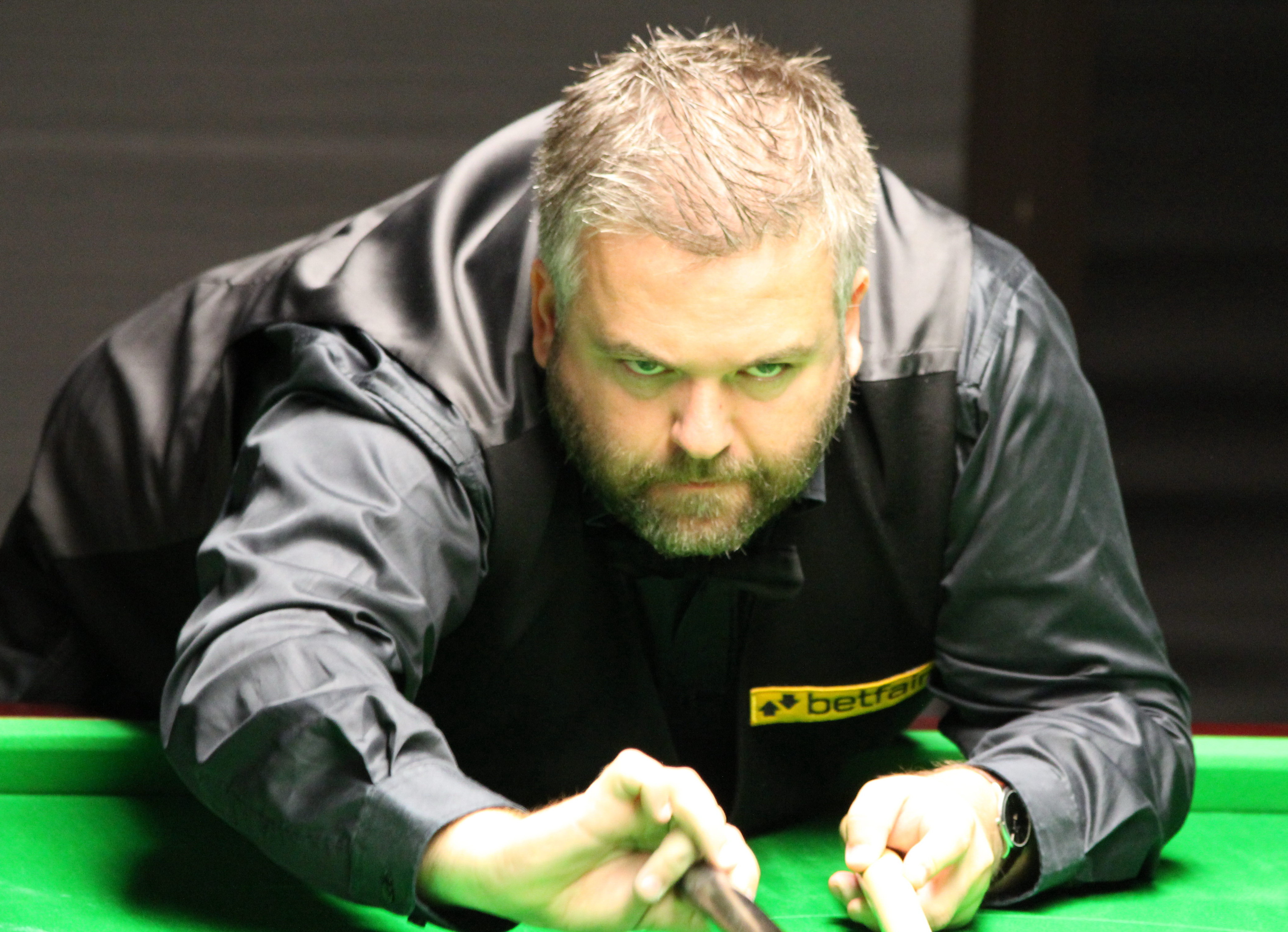 Marcus Campbell beim Paul Hunter Classic 2012